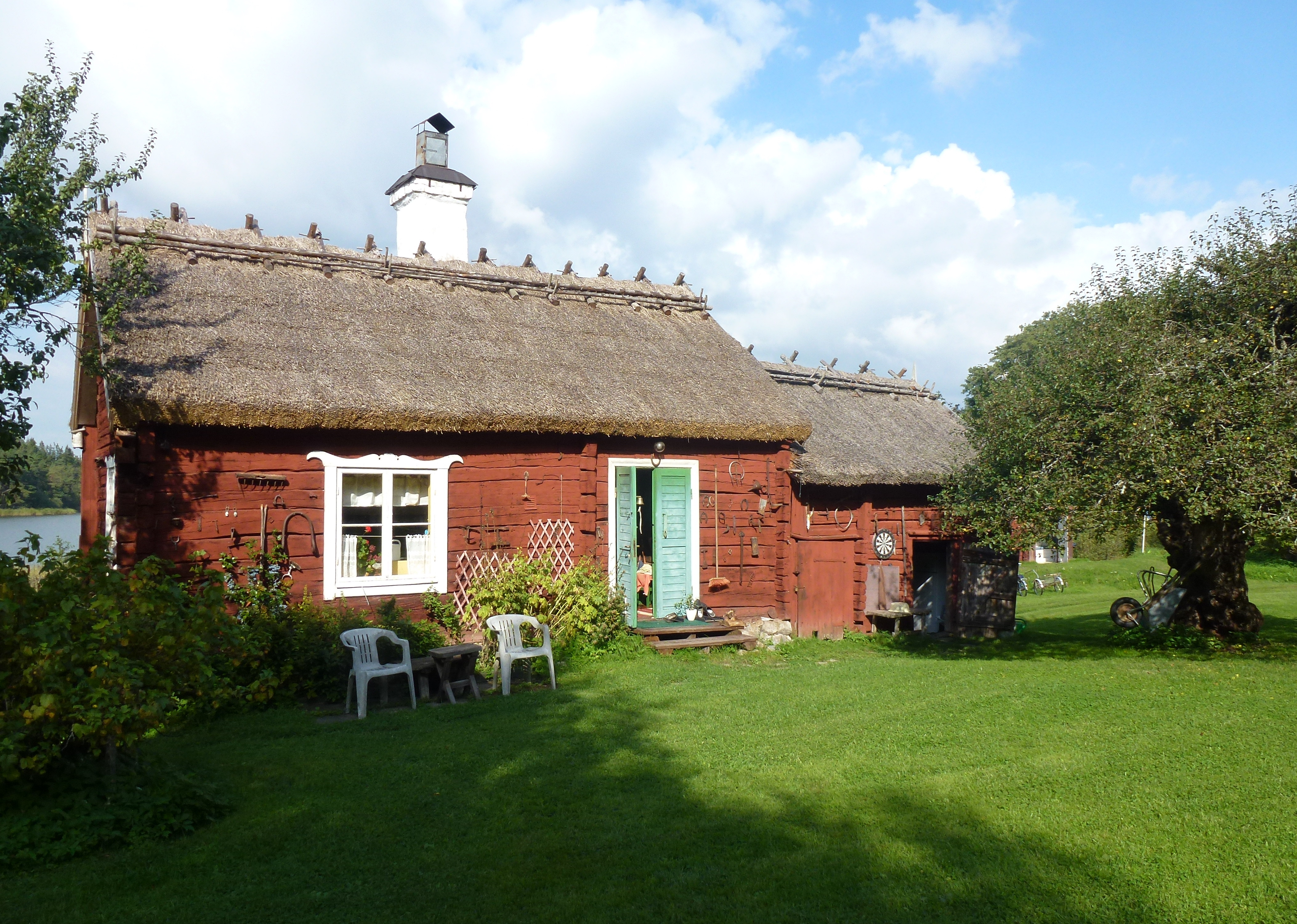 Fiskartorpets huvudbyggnad